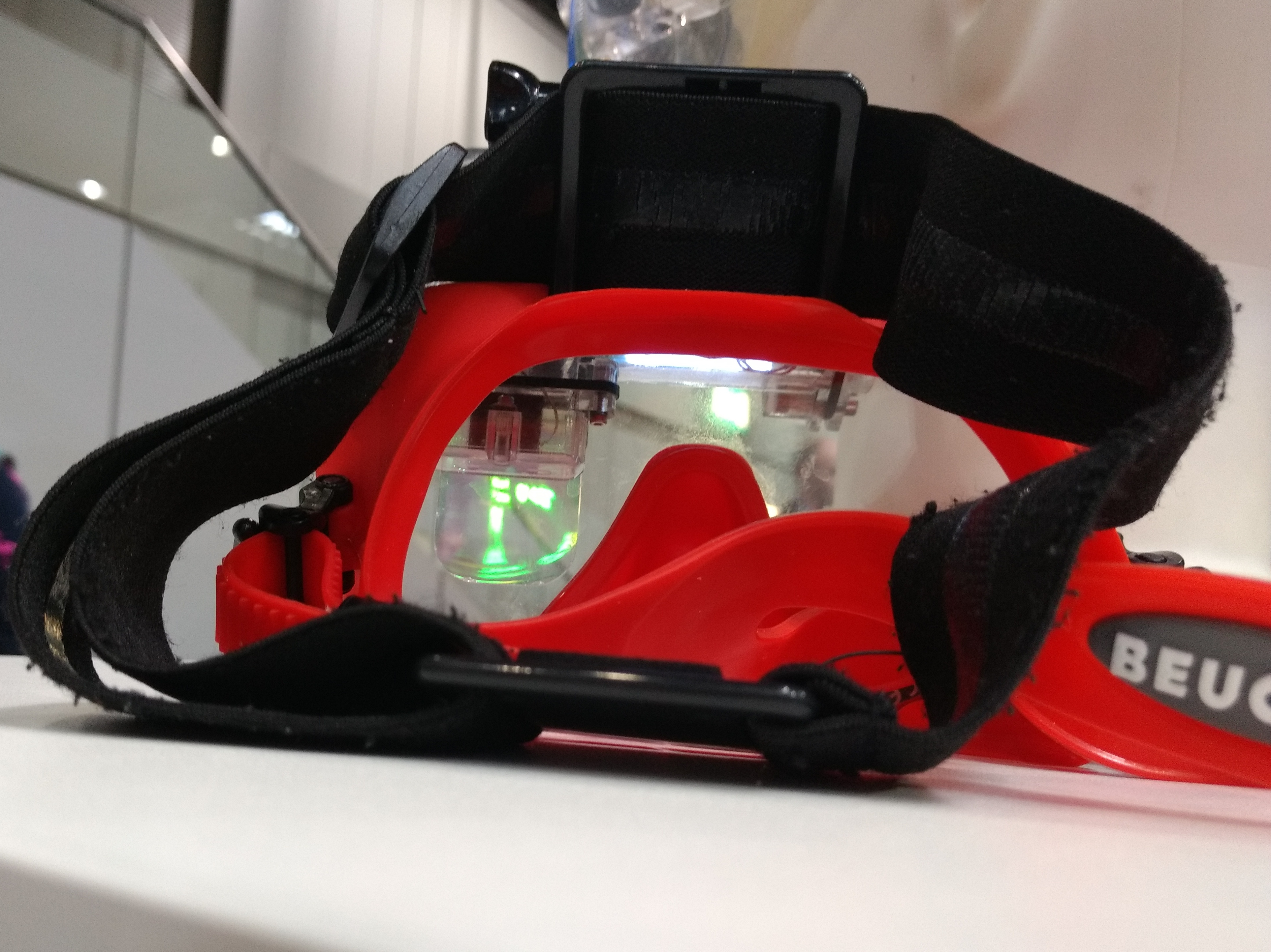 Tauchcomputer mit Headup-Display. Für den Träger der roten Maske erscheint die grüne Schrift in 2m Abstand.